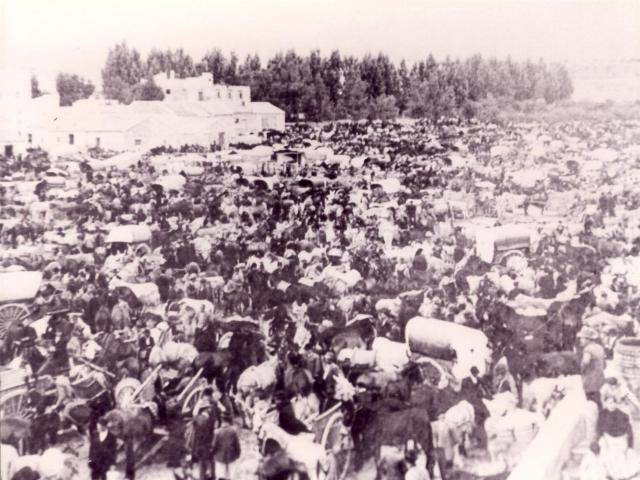 Imagen Antigua Feria del Ganado de Puerto Lumbreras